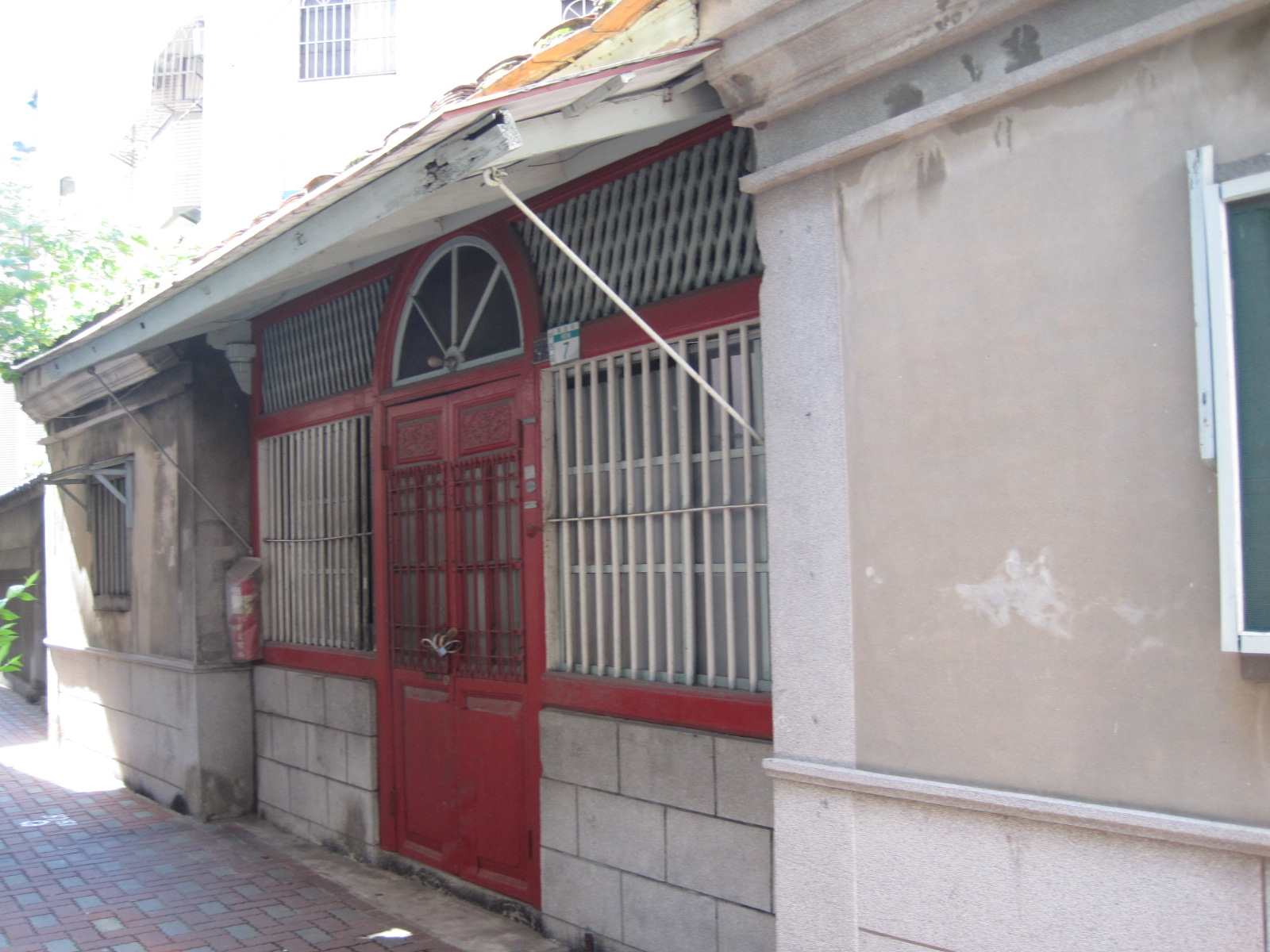 臺南劉瑞山古厝